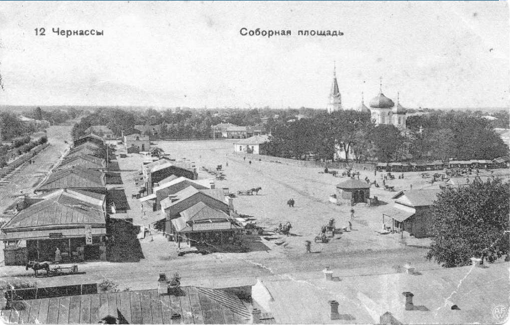 Майдан Соборний: Фото-листівка